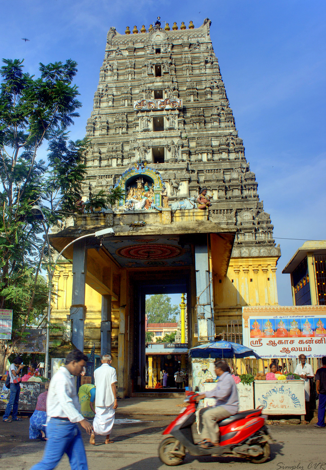 Vengeeswarar temple at vadapalani chennai.